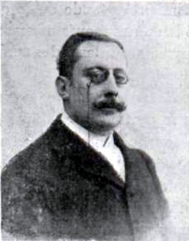 Conde de la Viñaza